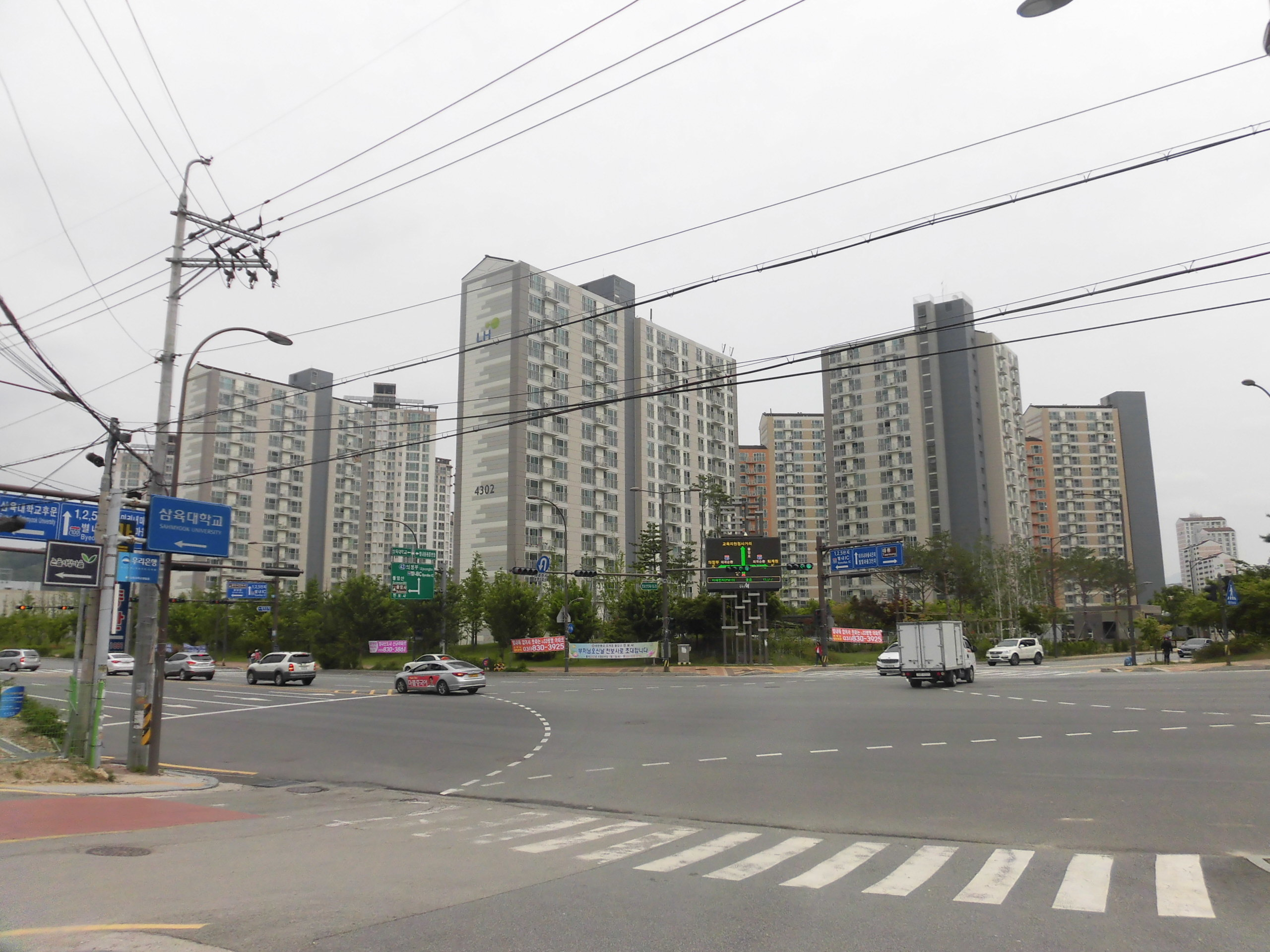 경기도 남양주시 별내동(삼육대학교 후문 부근)